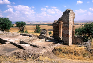 Villa di Sant'Igino